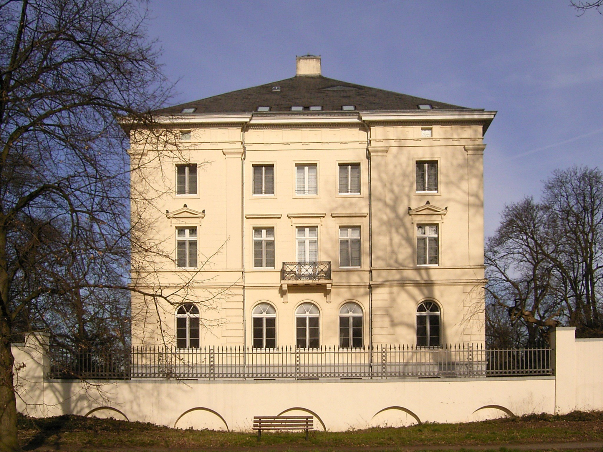 Schloss Mickeln in Düsseldorf